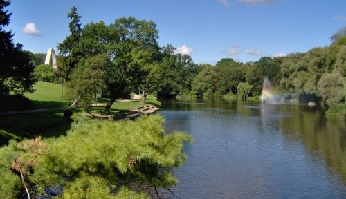 Jez. Rusałka, Park Kasprowicza w Szczecinie